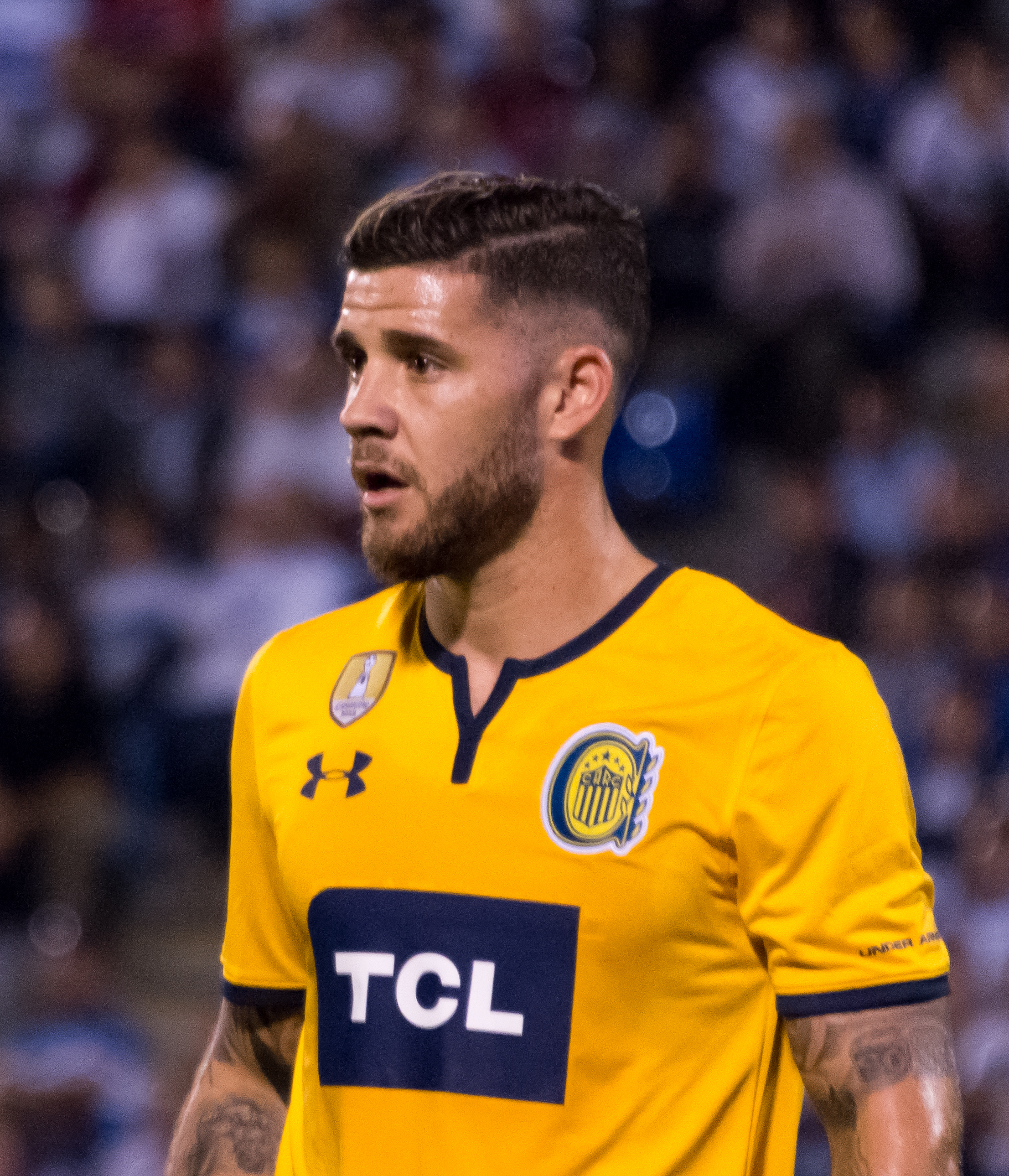 Miguel Barbieri, Universidad Católica v Rosario Central, Estadio San Carlos de Apoquindo, Las Condes, Santiago, Chile.